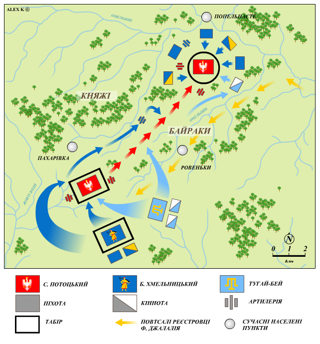 Битва під Жовтими Водами